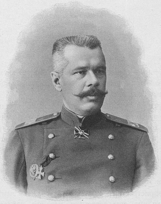 Рейс, Виктор Александрович — генерал-майор, участник Русско-Японской войны.